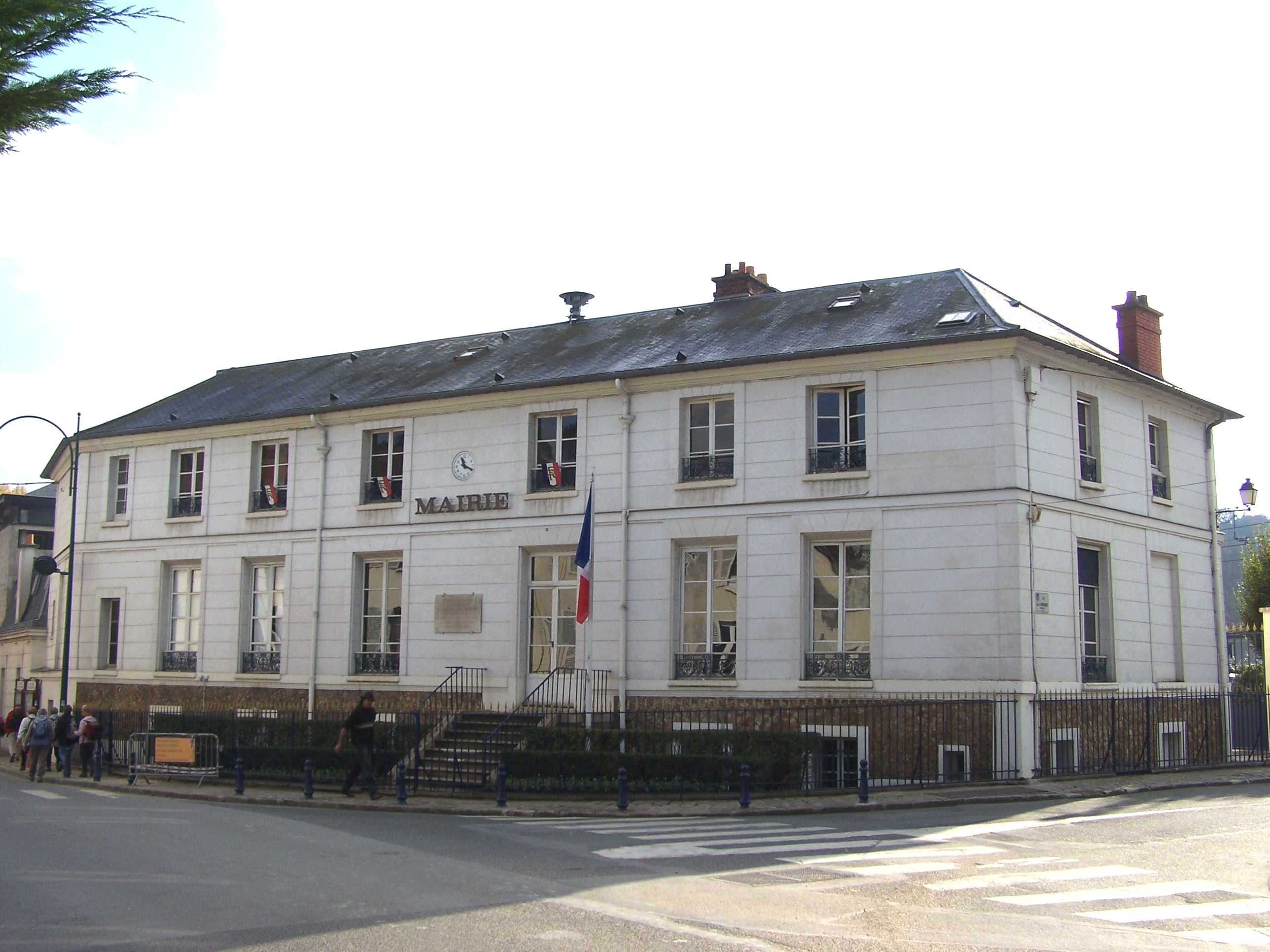 Mairie de Jouy-en-Josas (Yvelines, France)